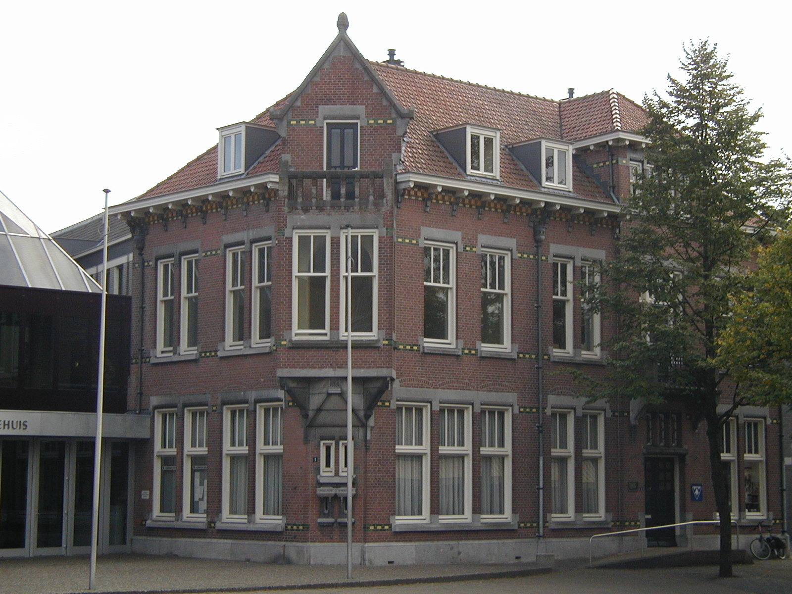 Het voormalige postkantoor van Deurne, 1 februari 2004. Foto zelf gemaakt.